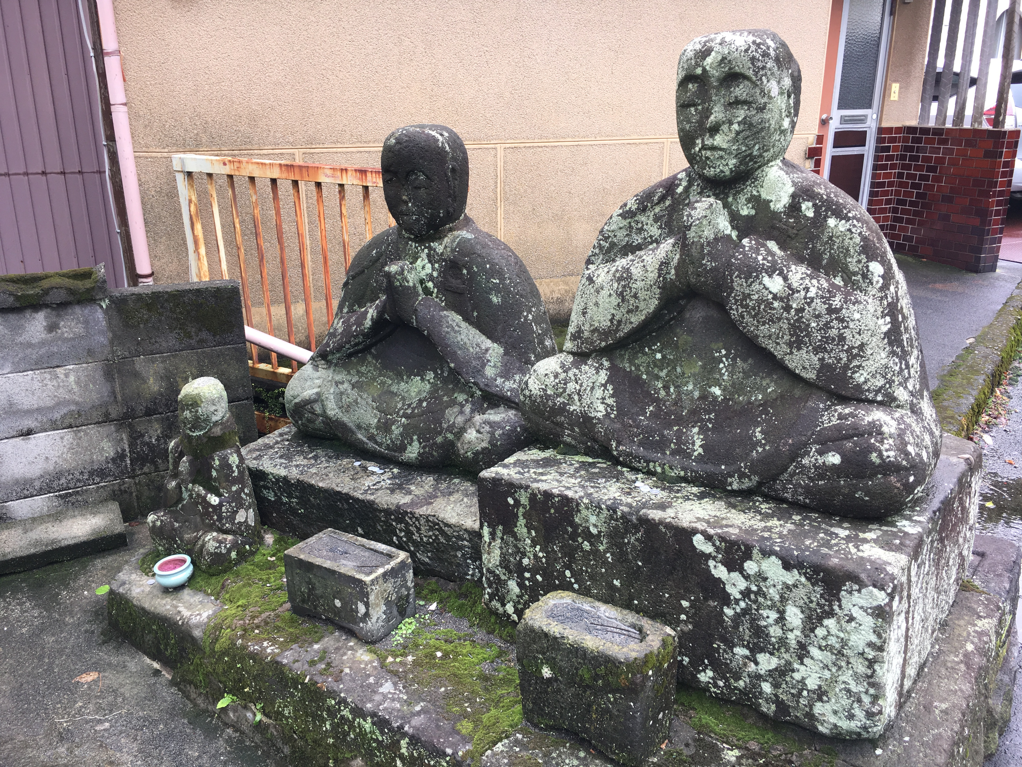 西の道祖神